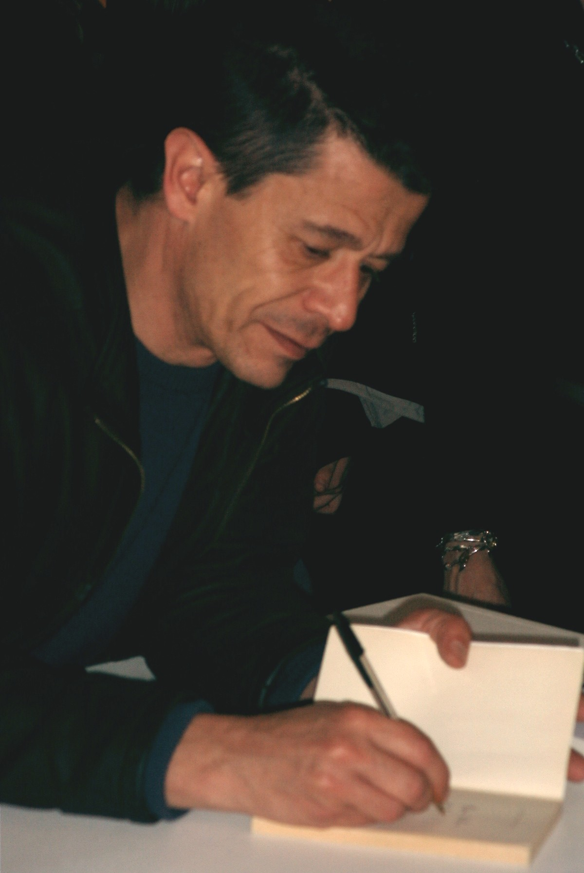 Photographie de Emmanuel Carrère